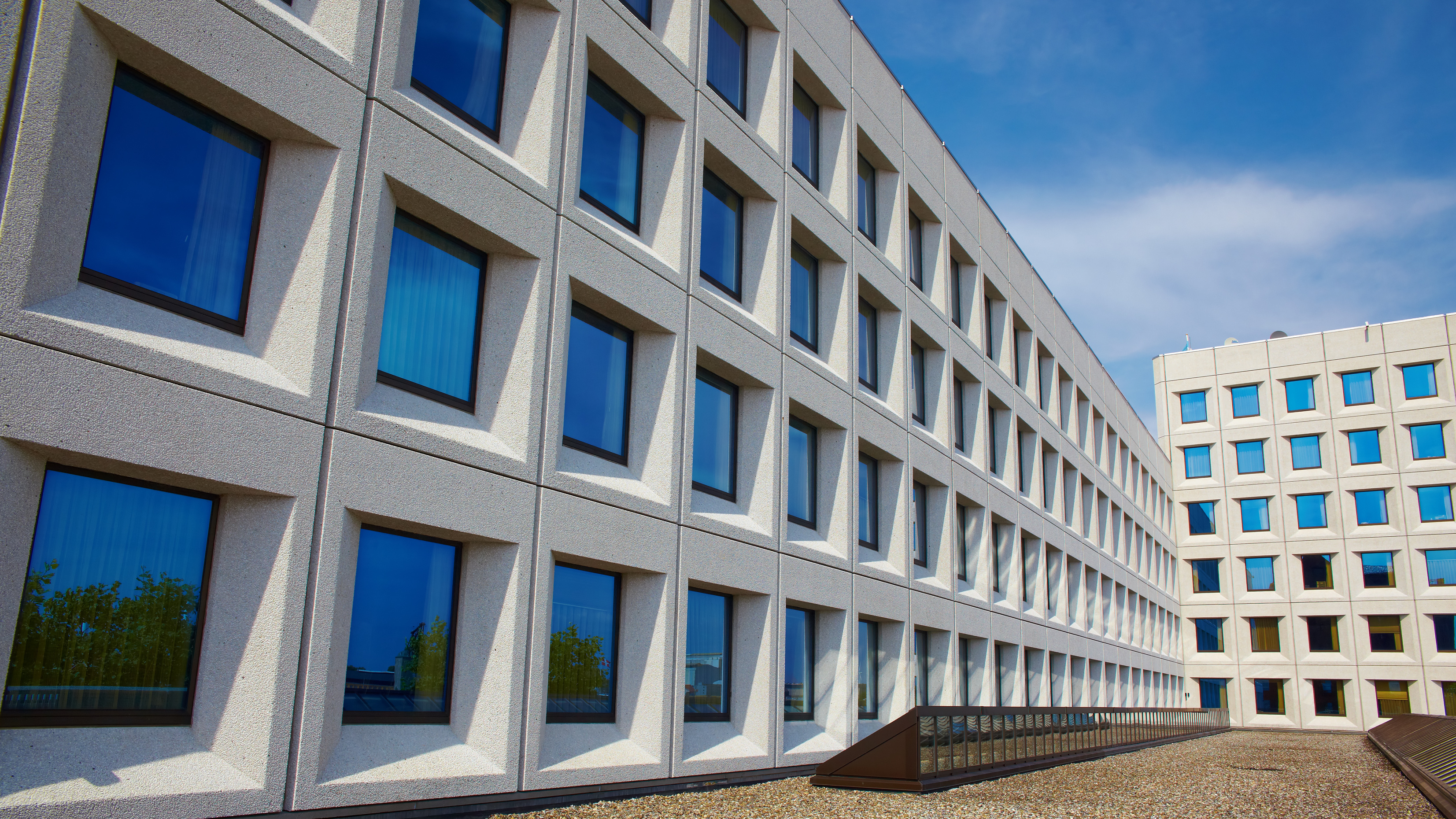 A.P. Møller-Mærsk A/S Headquarters in Copenhagen